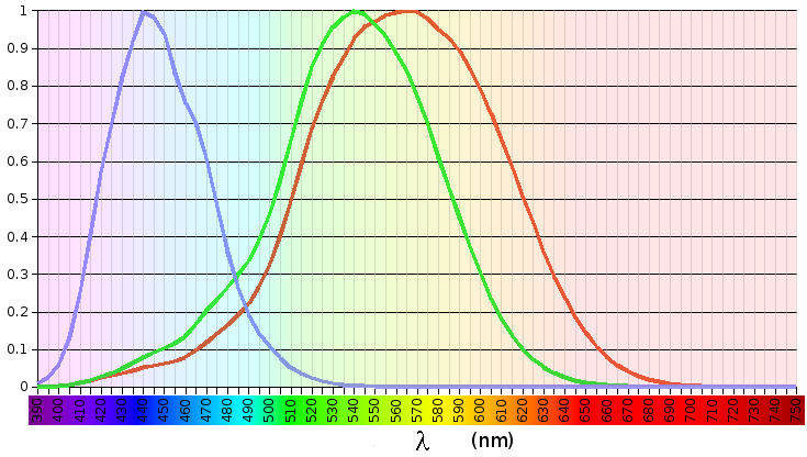 Spectrale gevoeligheid van de drie verschillende soorten kegeltjes in het netvlies. Cijfers ontleend aan "the Stockman & Sharpe (2000) 10° quantal cone fundamentals"; grafiek eigen werk koenB ( Calc).